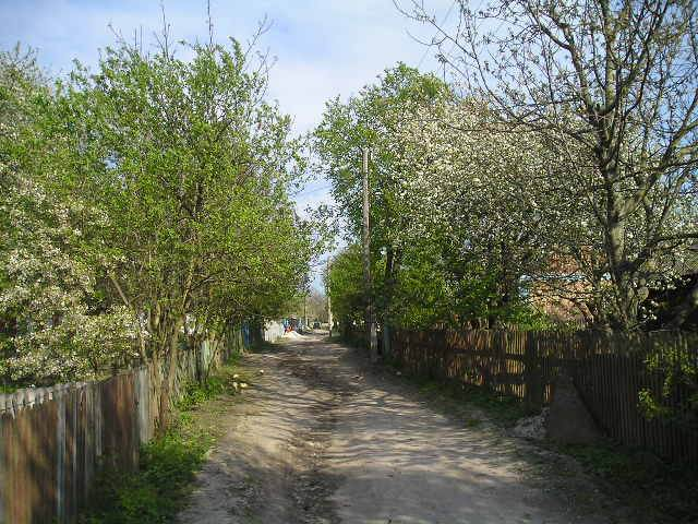 Glukhivtsi village, Ukraine. Young Pioneer's street